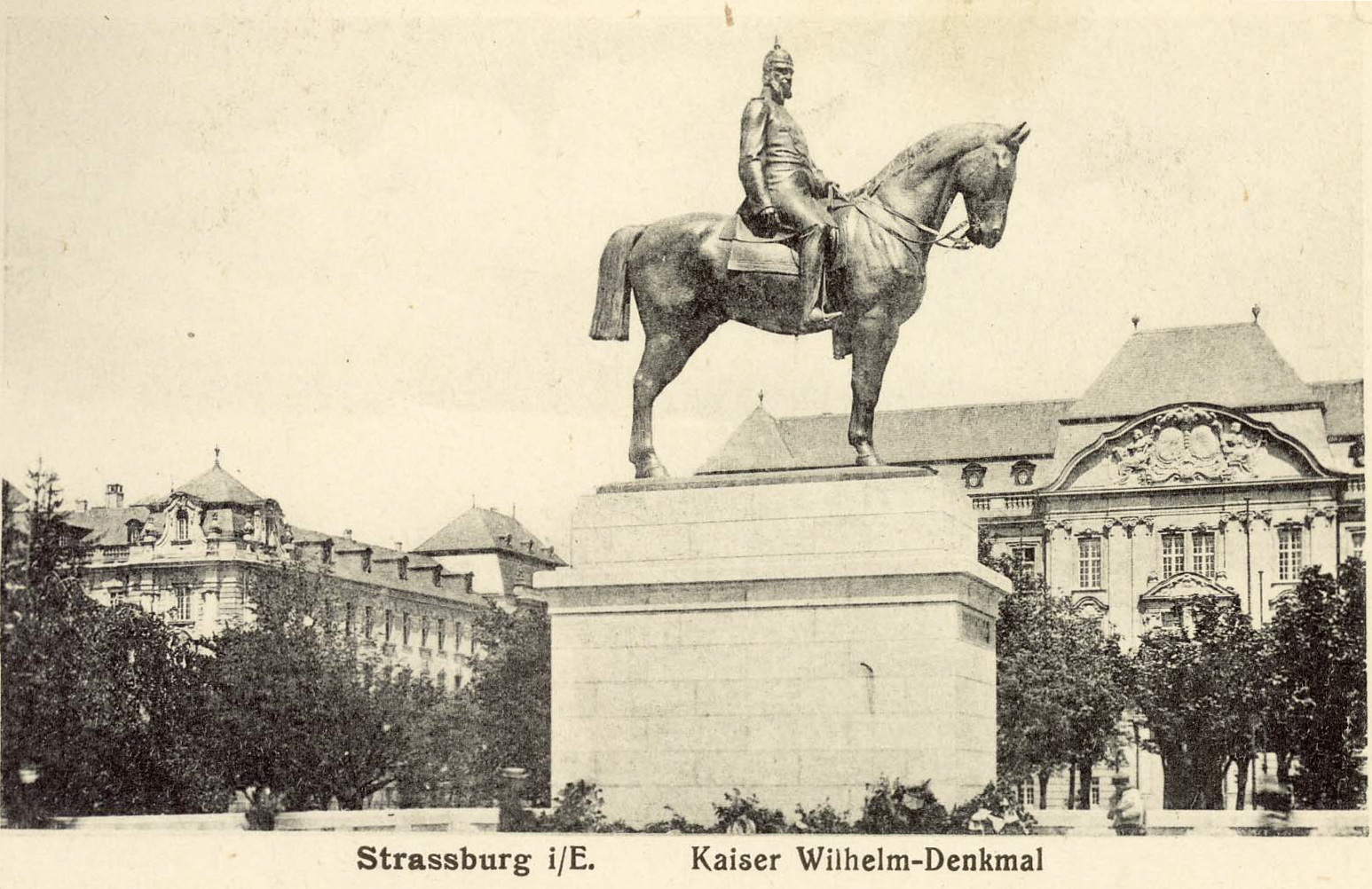 Statue équestre de Guillaume 1er d'Allemagne à Strasbourg. Place de l'empereur (aujourd'hui place de la république)